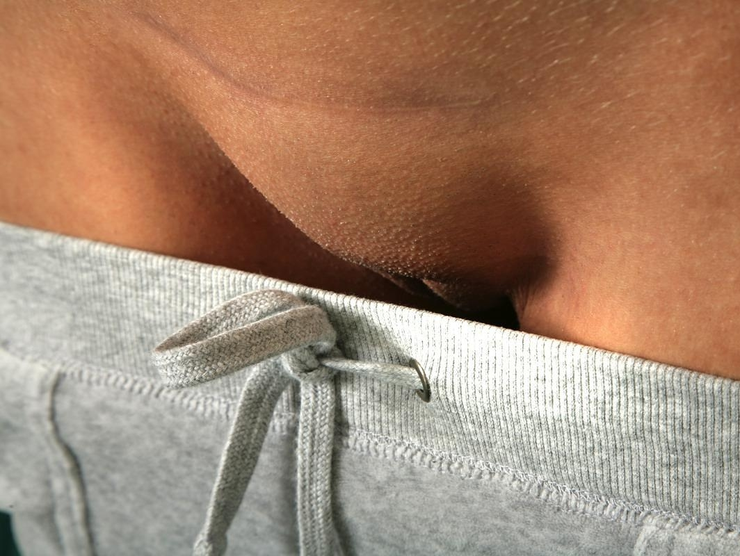 Dopo una sezione cesarea, nella parte inferiore dell'addome rimane una sottile cicatrice, la cicatrice della sezione cesarea. Con la giusta cura guarisce nella maggior parte dei casi senza complicazioni.